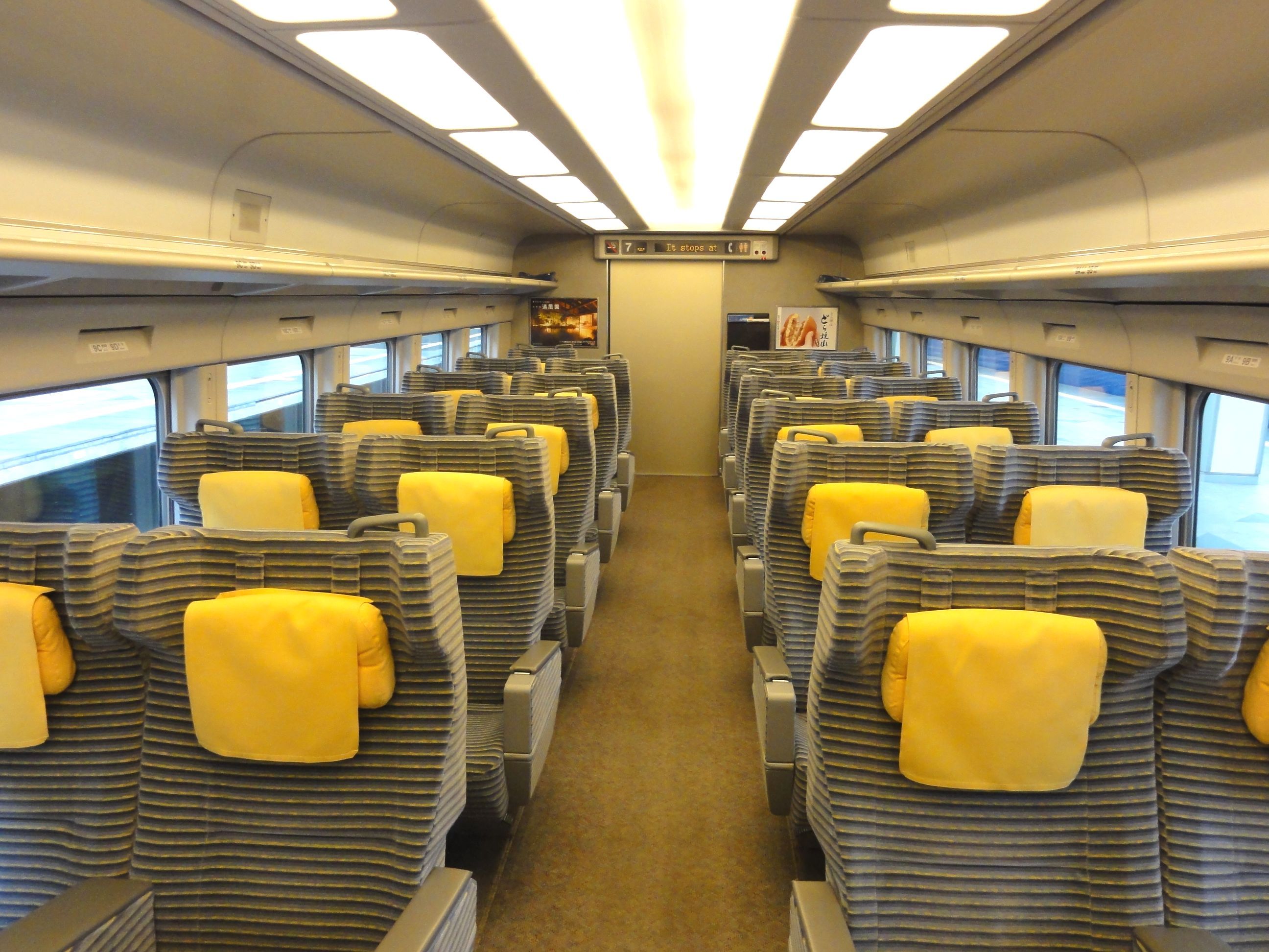 新幹線E2系電車・N1編成グリーン車車内